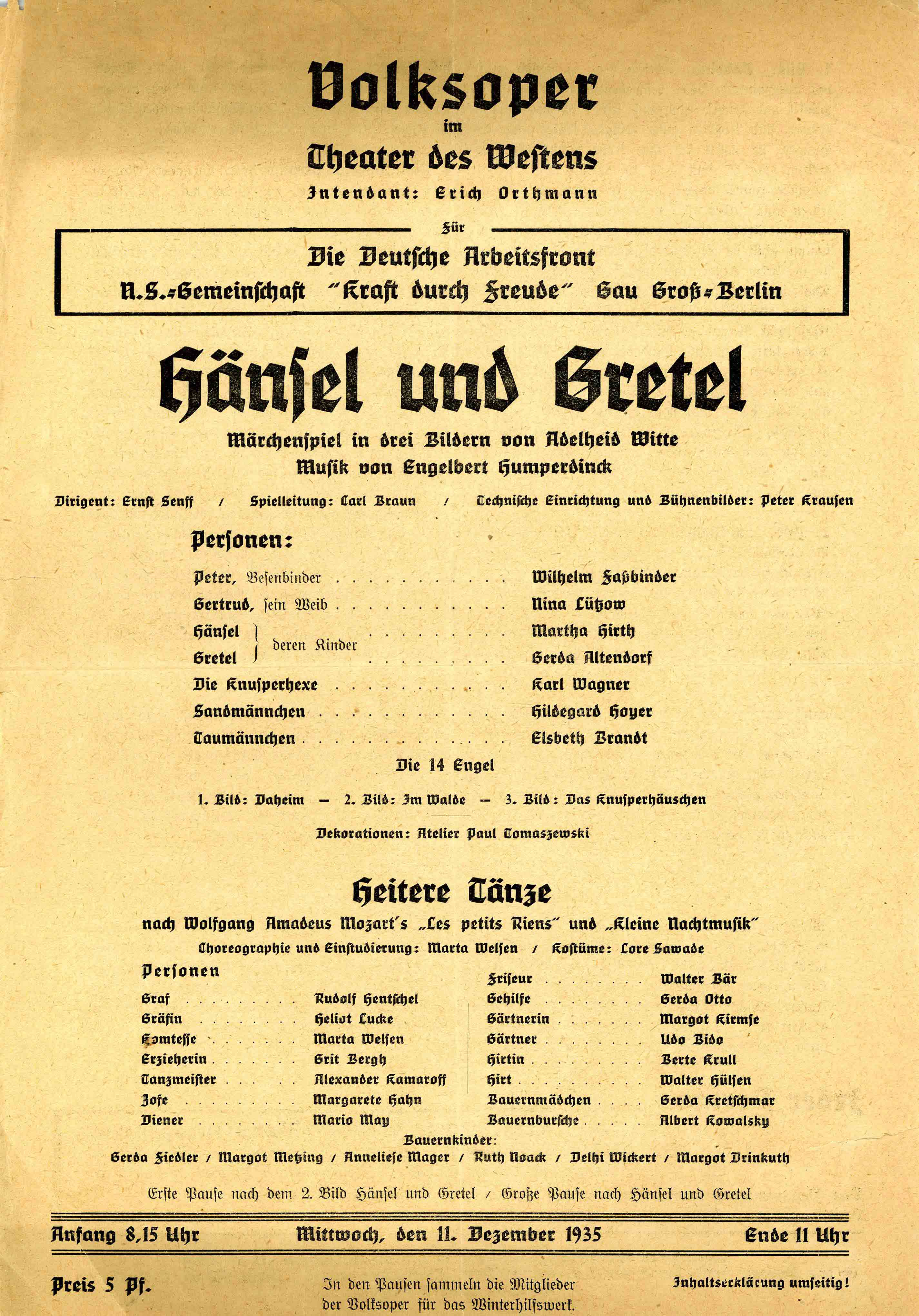 Volksoper Berlin im Theater des Westens, 1935